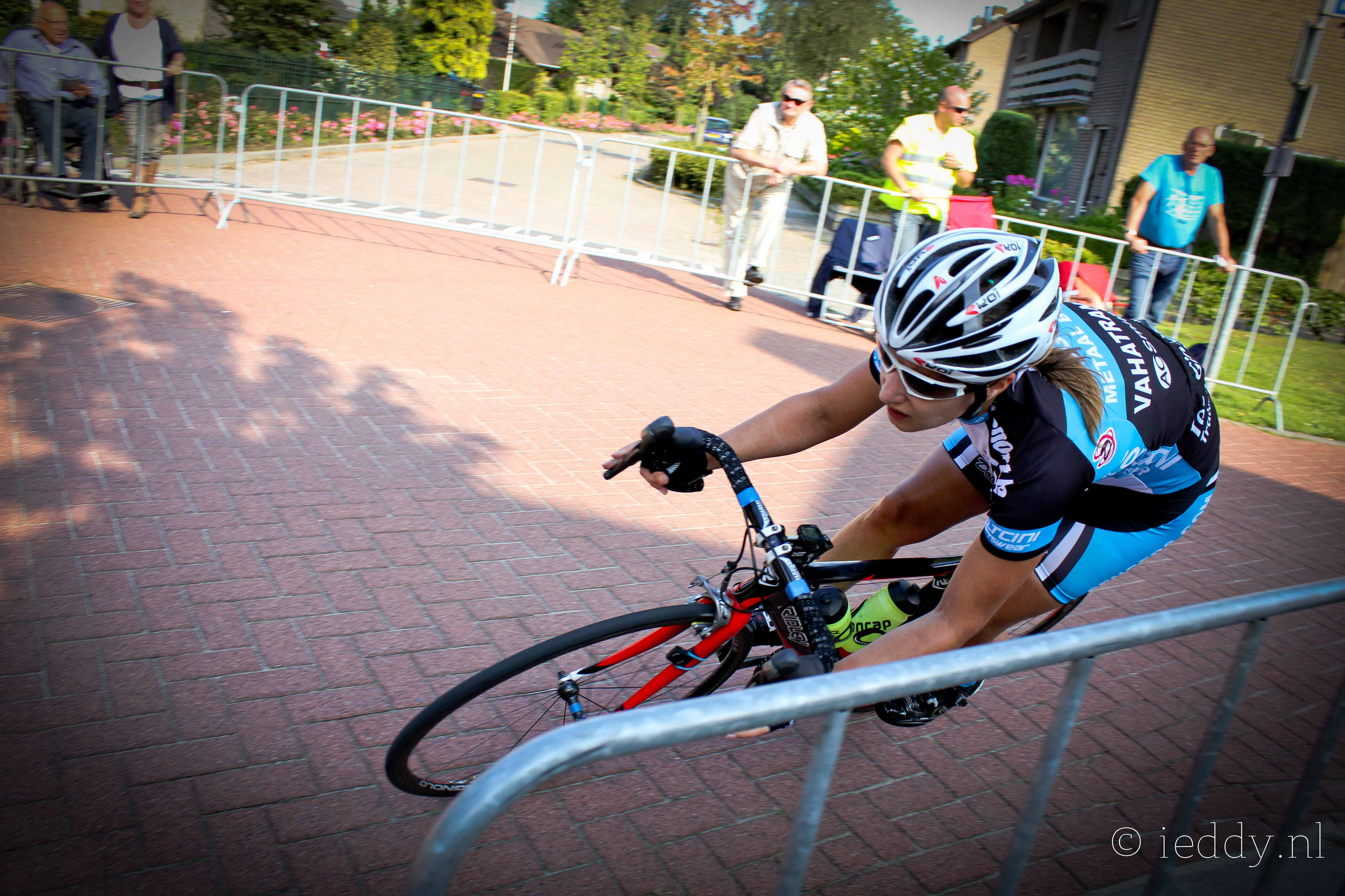 Sengers Ladies Cycling Team Draai van de Kaai 2011